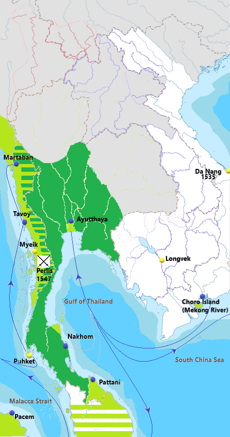 Portugueses na Tailândia